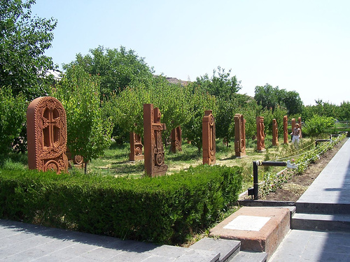 Khatchkars at Oshakan Church.